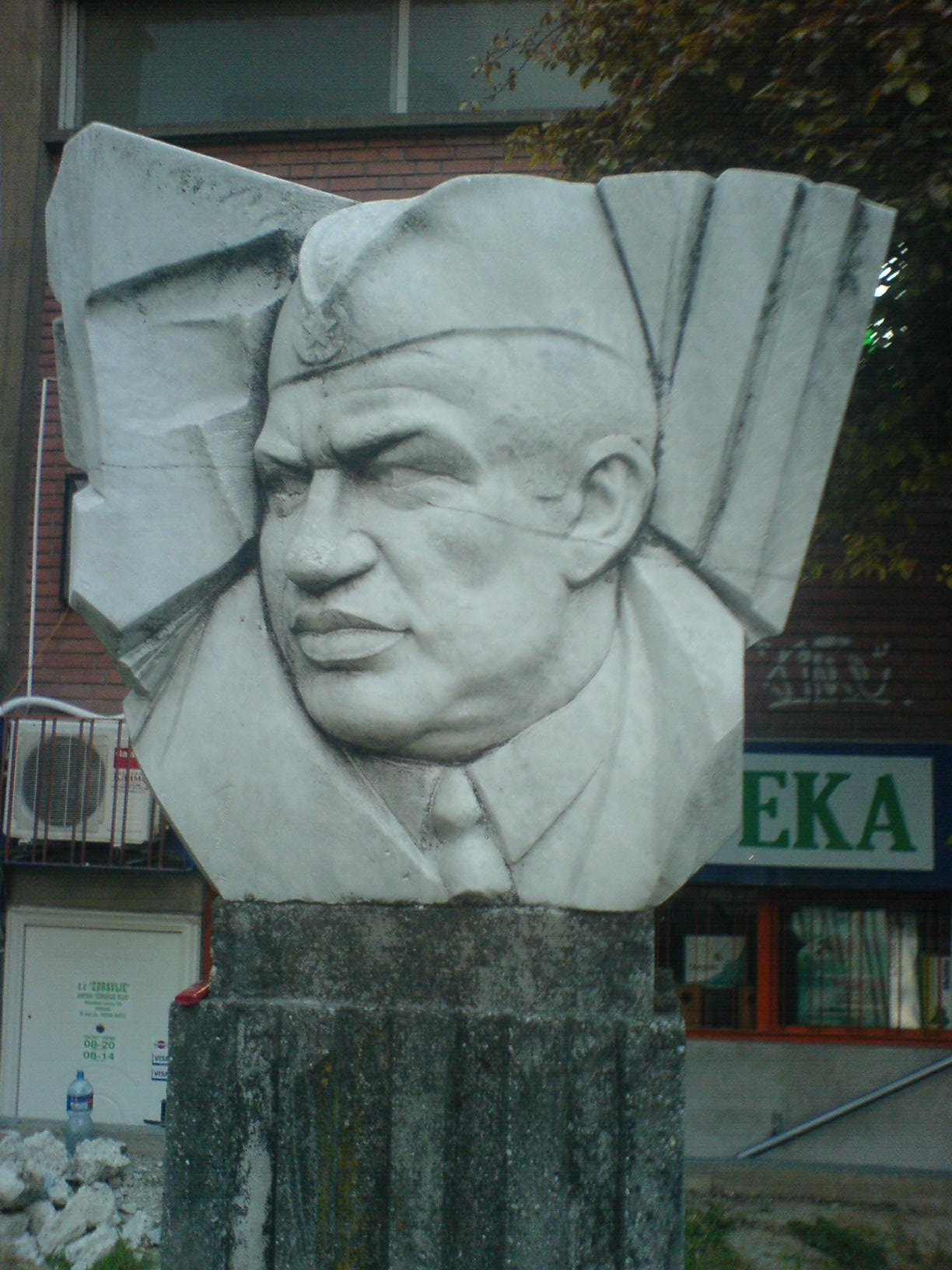 Споменик Виктору Бубњу (1918-1972) у улици Народних хероја на Новом Београду.